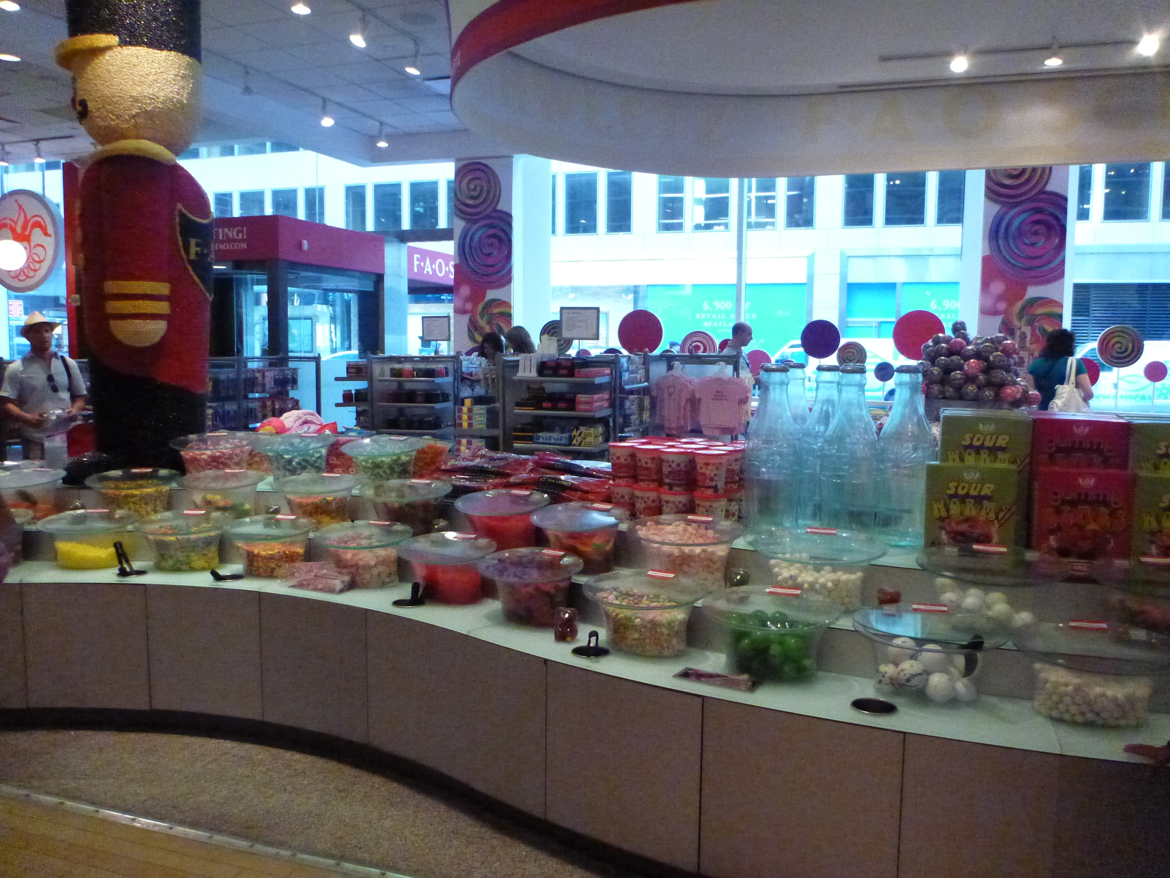 FAO Schwarz